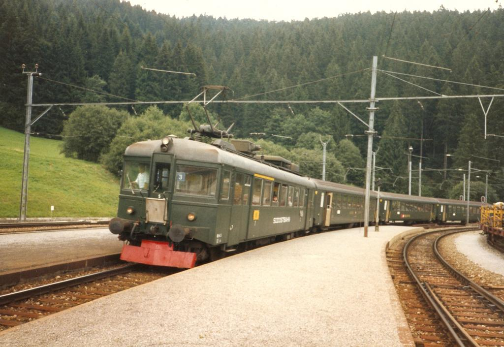 SOB-Triebwagen ABe 4/4 5 mit einem langen Personenzug in Biberbrugg